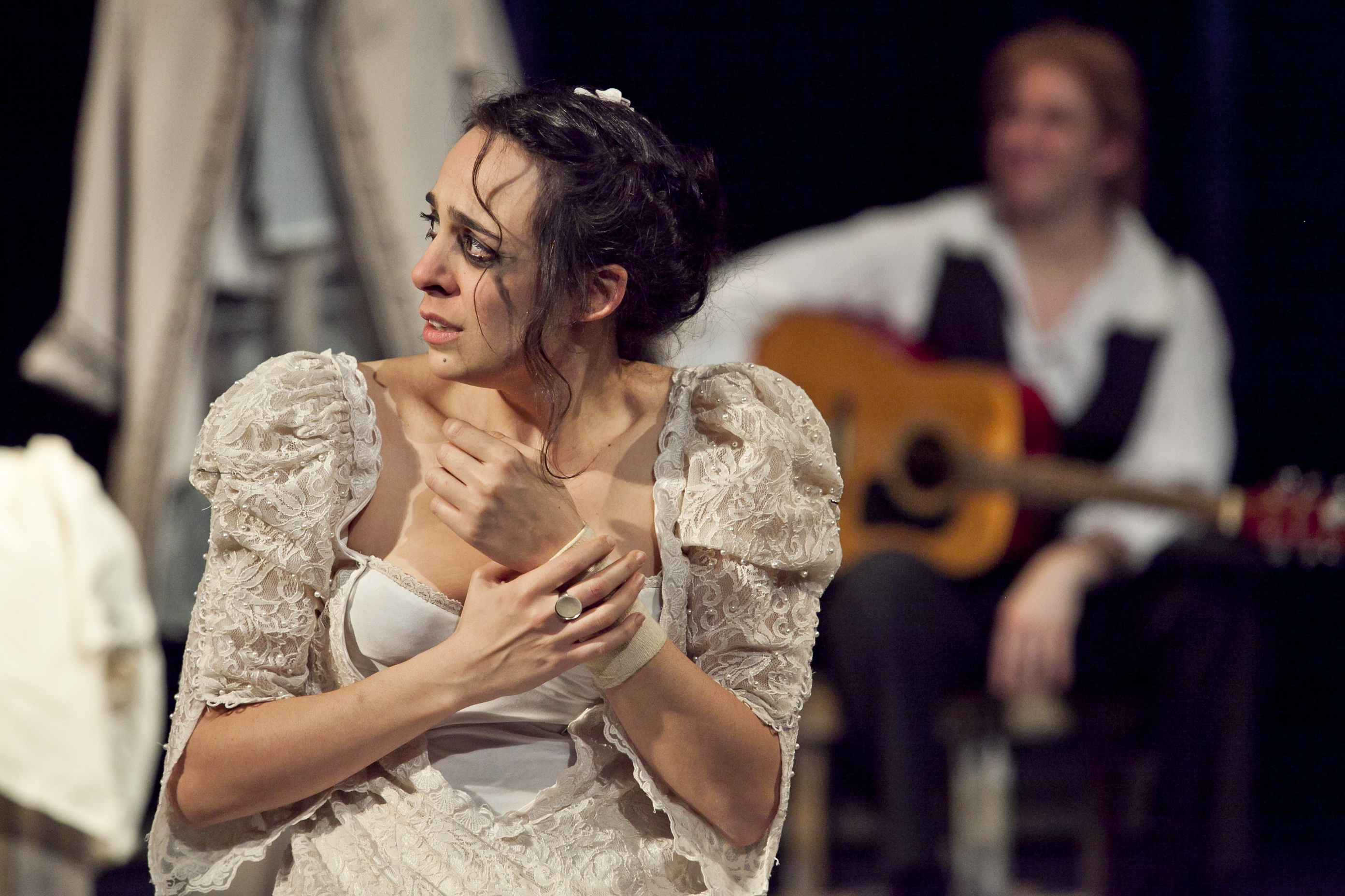 נטע שפיגלמן בדון ז'ואן